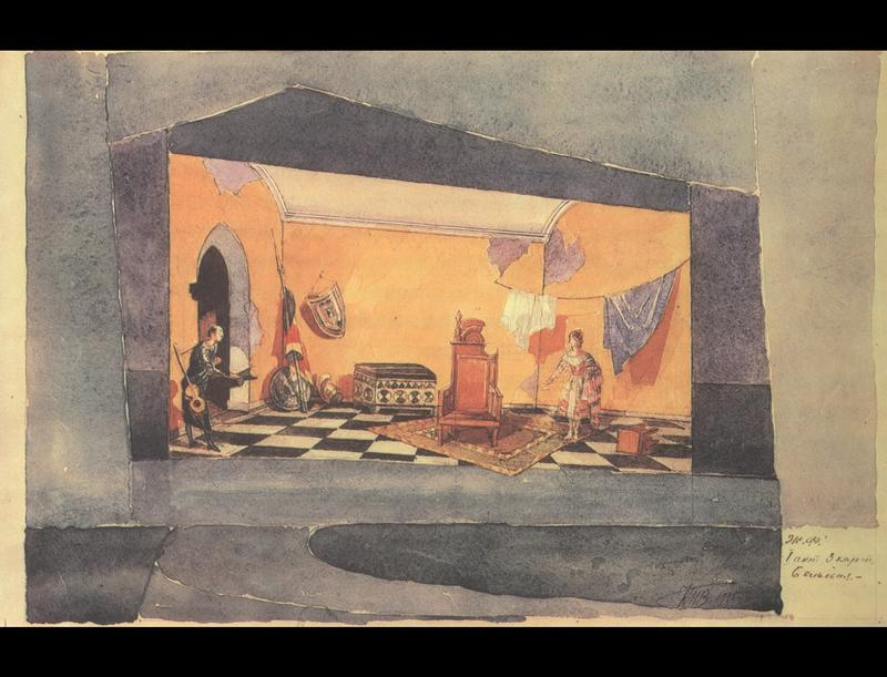 Эскиз декорации к спектаклю "Безумный день, или женитьба Фигаро" 1935. Из собрания Санкт-Петербургского государственного музея театрального и музыкального искусства